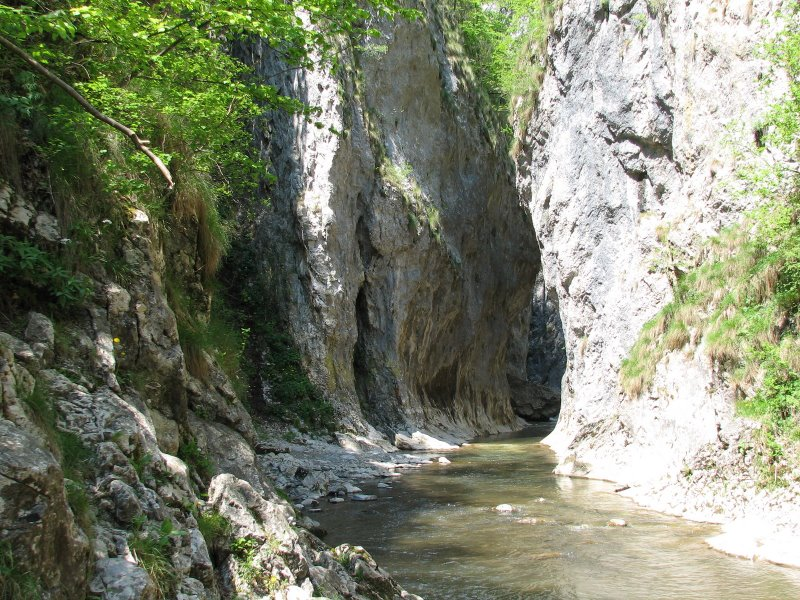 Canionul central din Cheile Râmeţului